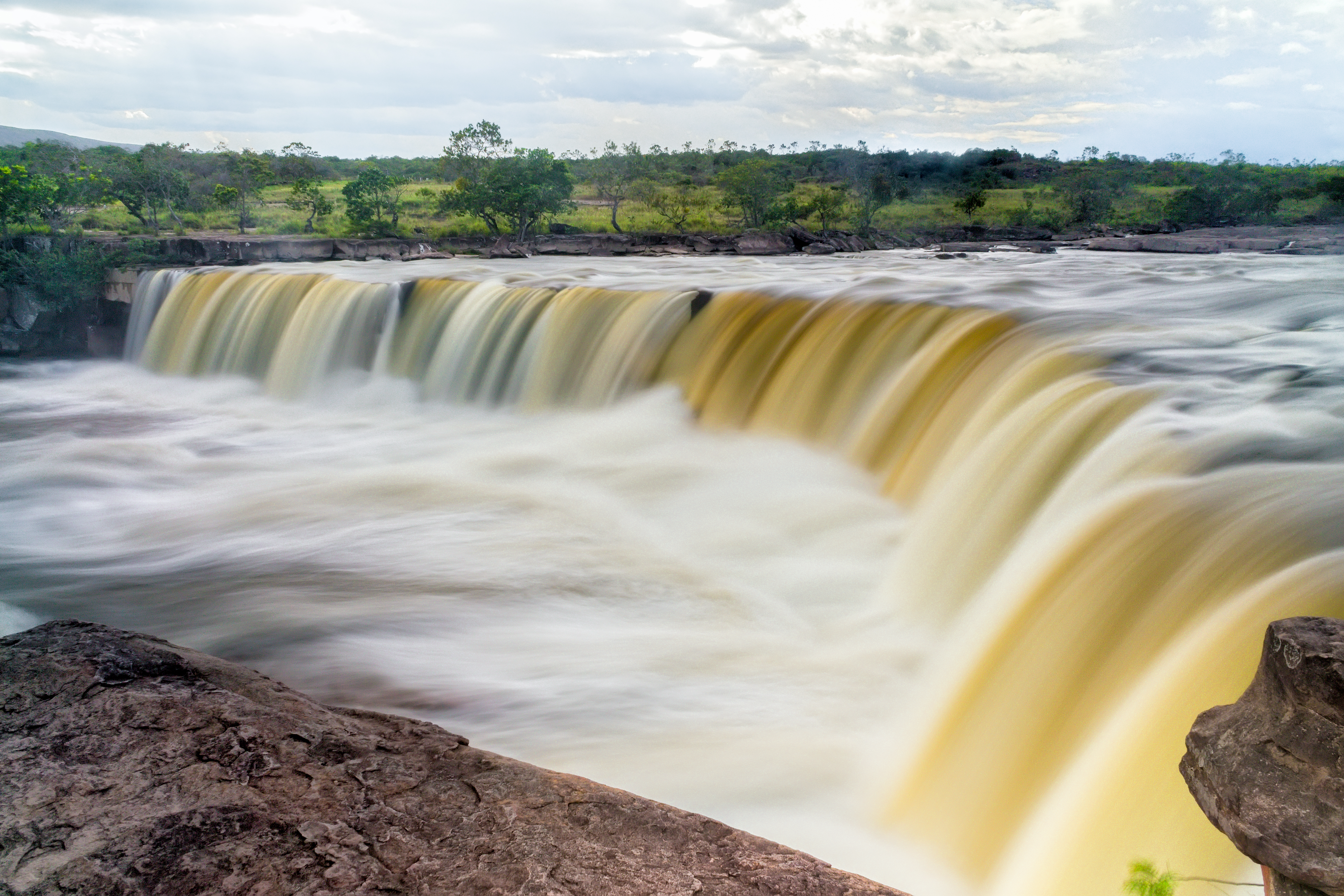 Yuruaní Falls